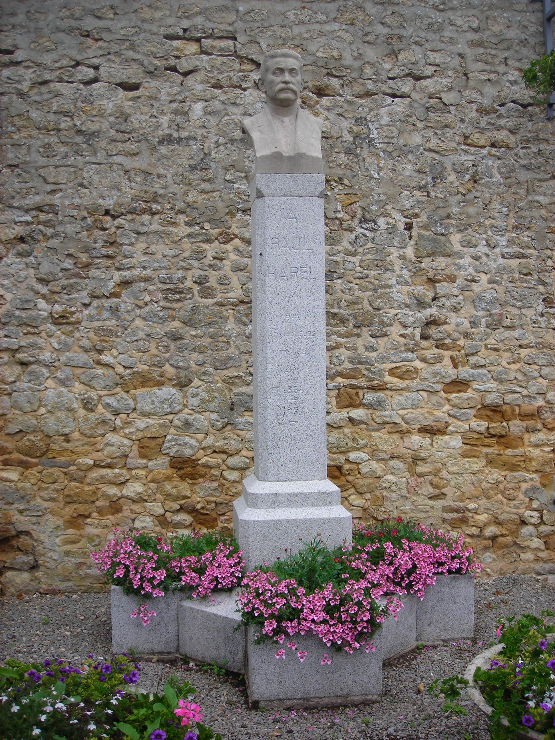 Portrait de Paul Harel (1854 à Échauffour - 1927), poète, aubergiste. Photo prise à Échauffour (Orne, France)